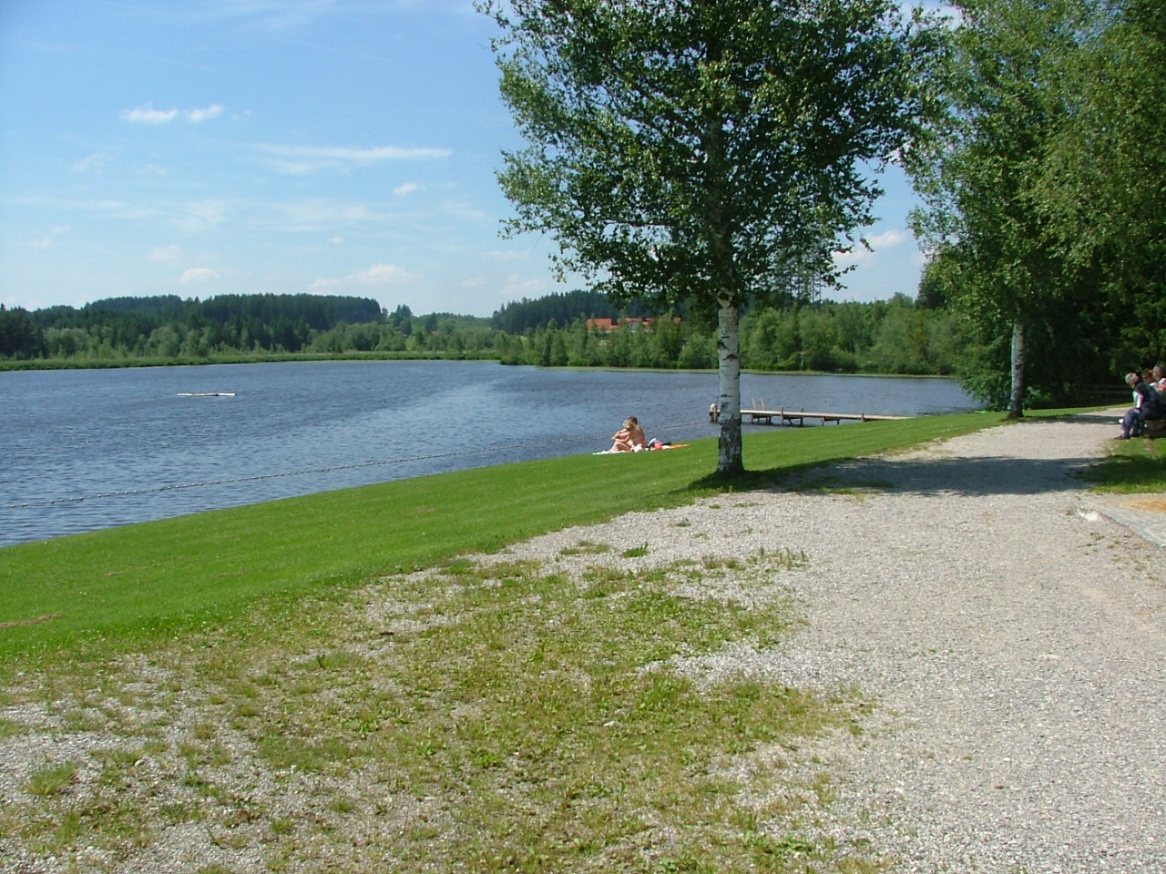 Elbsee